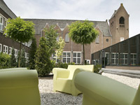 Foto van binnenplaats Titus Brandsma Lyceum (TBL)